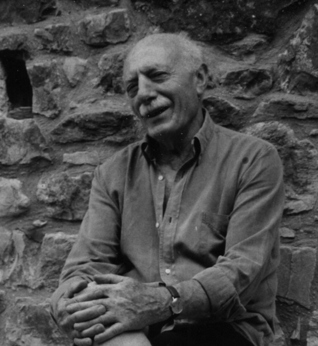 Foto familiare fatta a Todi